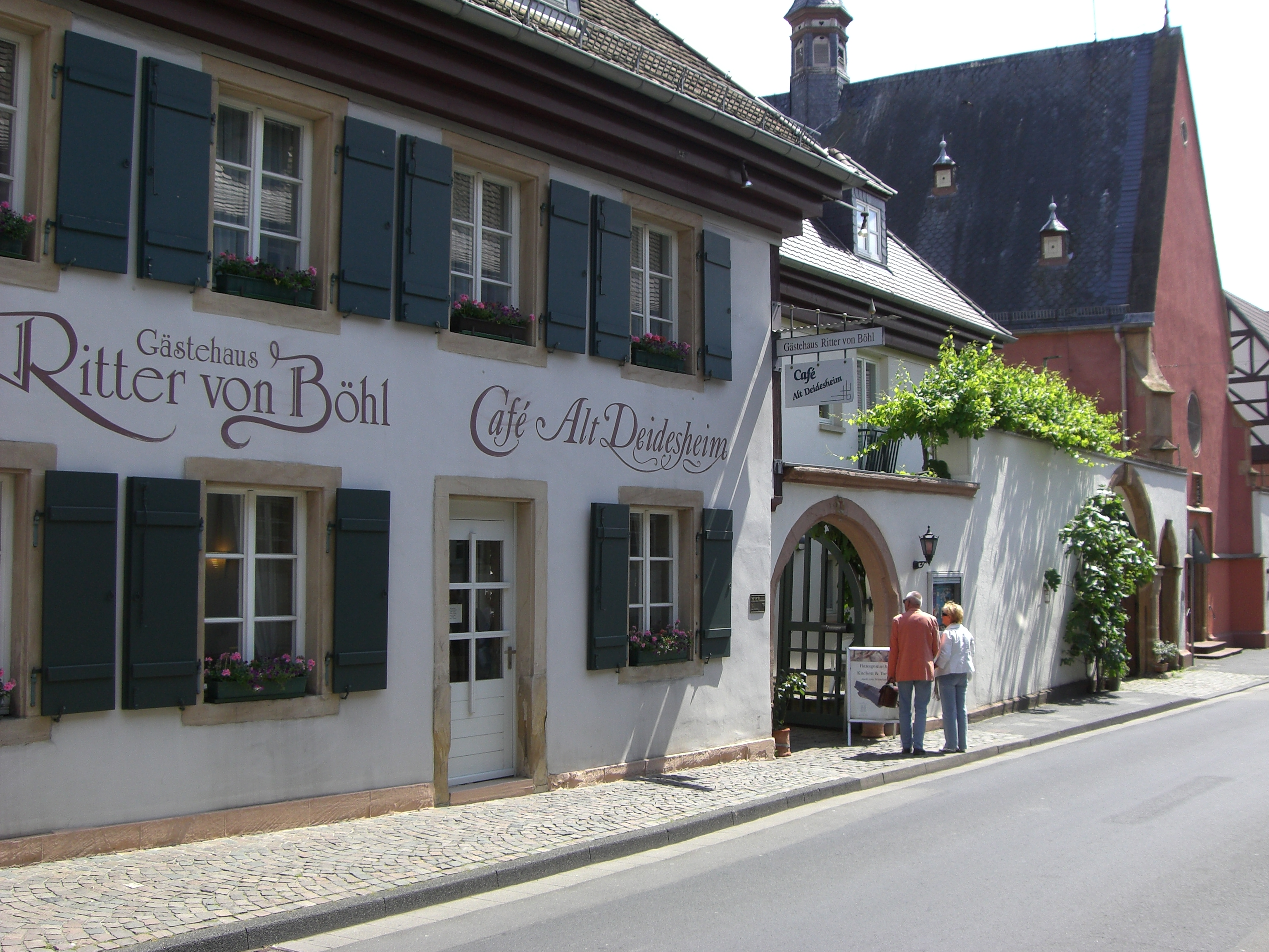 Das Gästehaus "Ritter von Böhl" mit dem "Café Alt Deidesheim", dahinter die Spitalkapelle